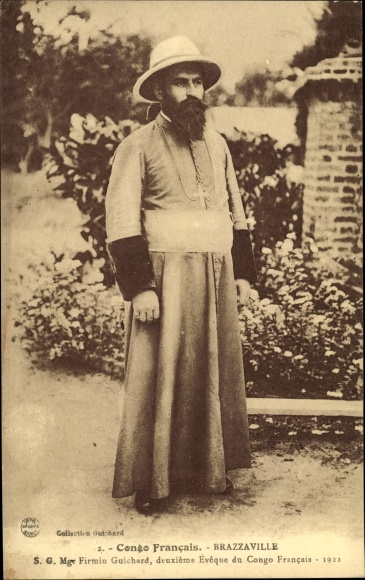 Mgr Firmin Guichard C.S.Sp., évêque du Congo français en 1922.